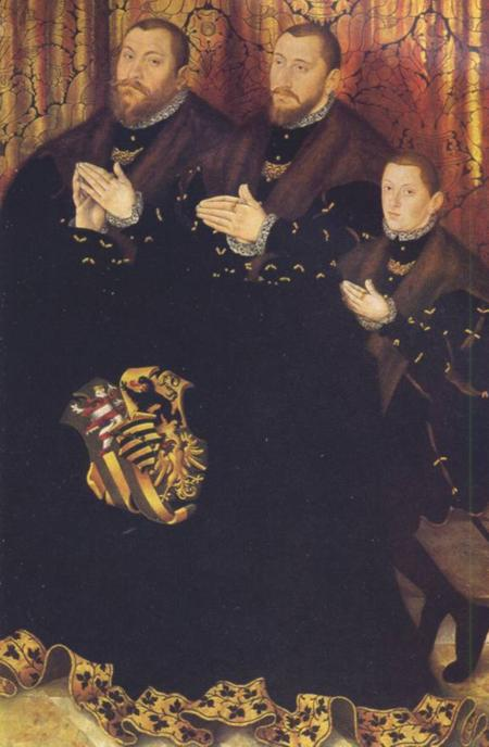 von links nach rechts: Johann Friedrich II. (1529-1595), Johann Wilhelm (1530-1573) und Johann Friedrich III. (1538-1565) von Sachsen